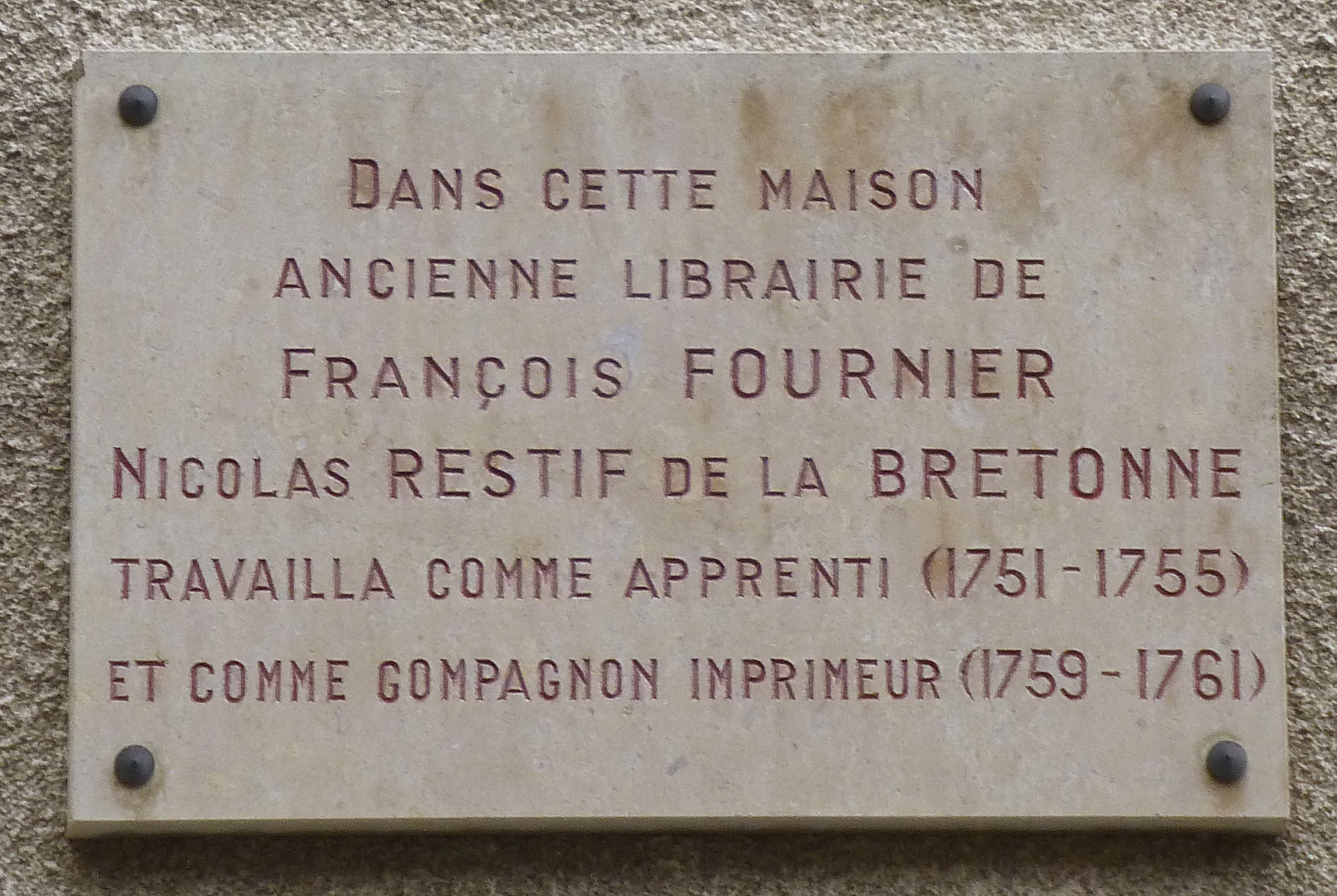 Auxerre (Yonne) : dans cette maison, ancienne librairie de François Fournier, Nicolas Restif de la Bretonne travailla comme apprenti (1751-1755) puis comme compagnon imprimeur (1759-1761)